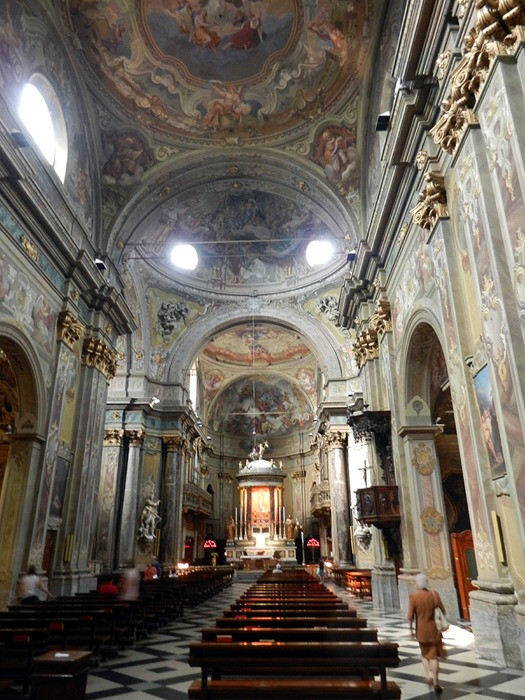 Como - Interno del Santuario del Santissimo Crocifisso